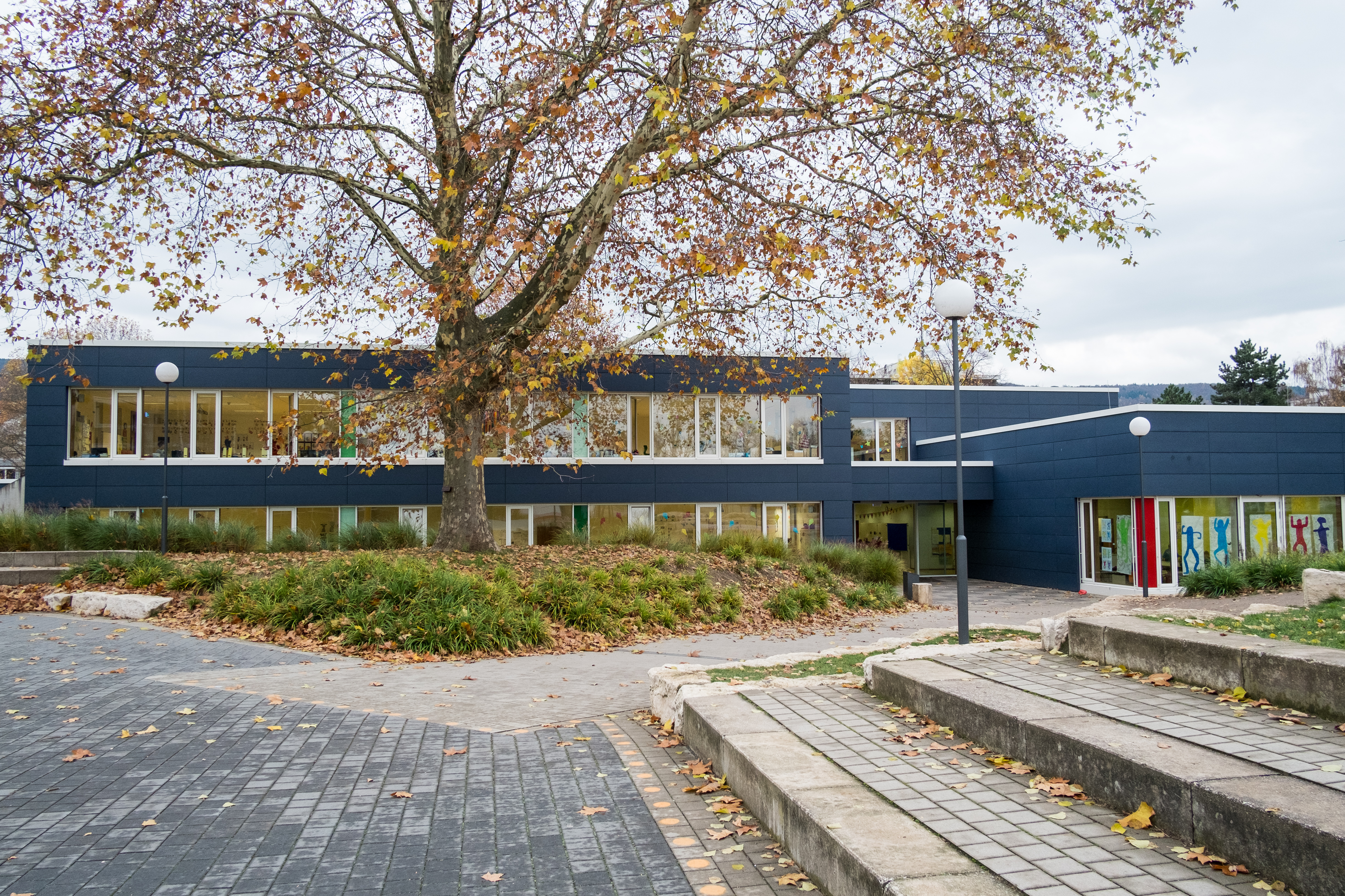 Blick auf die Grundschule/Primarstufe der IGH. Eingang der Schule und Zugang zum Schulhof.